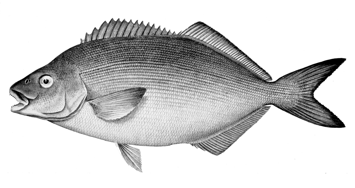 Latridopsis forsteri